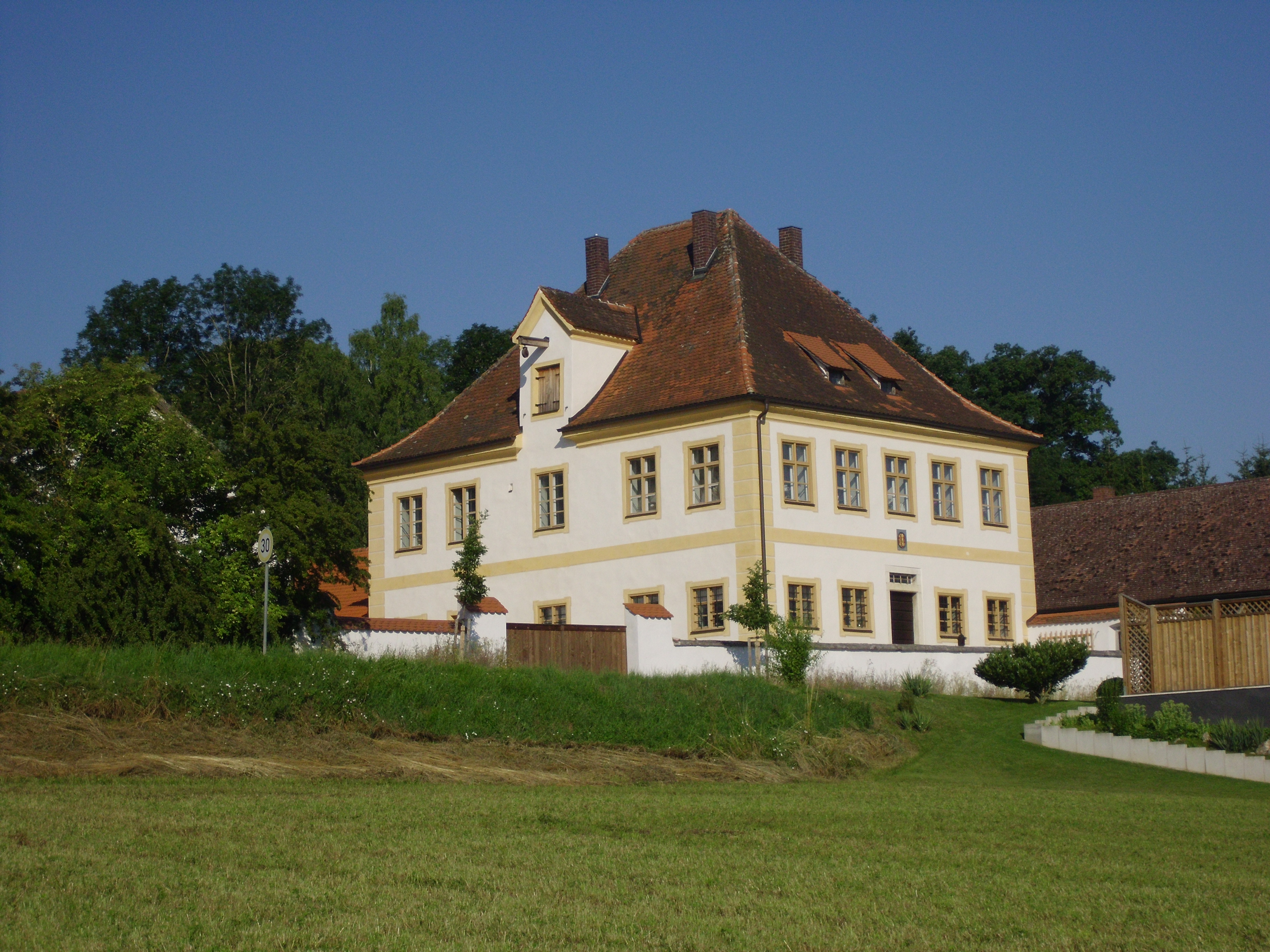 Großhöbing, Ortsteil der Stadt Greding im mittelfränkischen Landkreis Roth in Bayern, ehemaliger Pfarrhof (Baudenkmal)